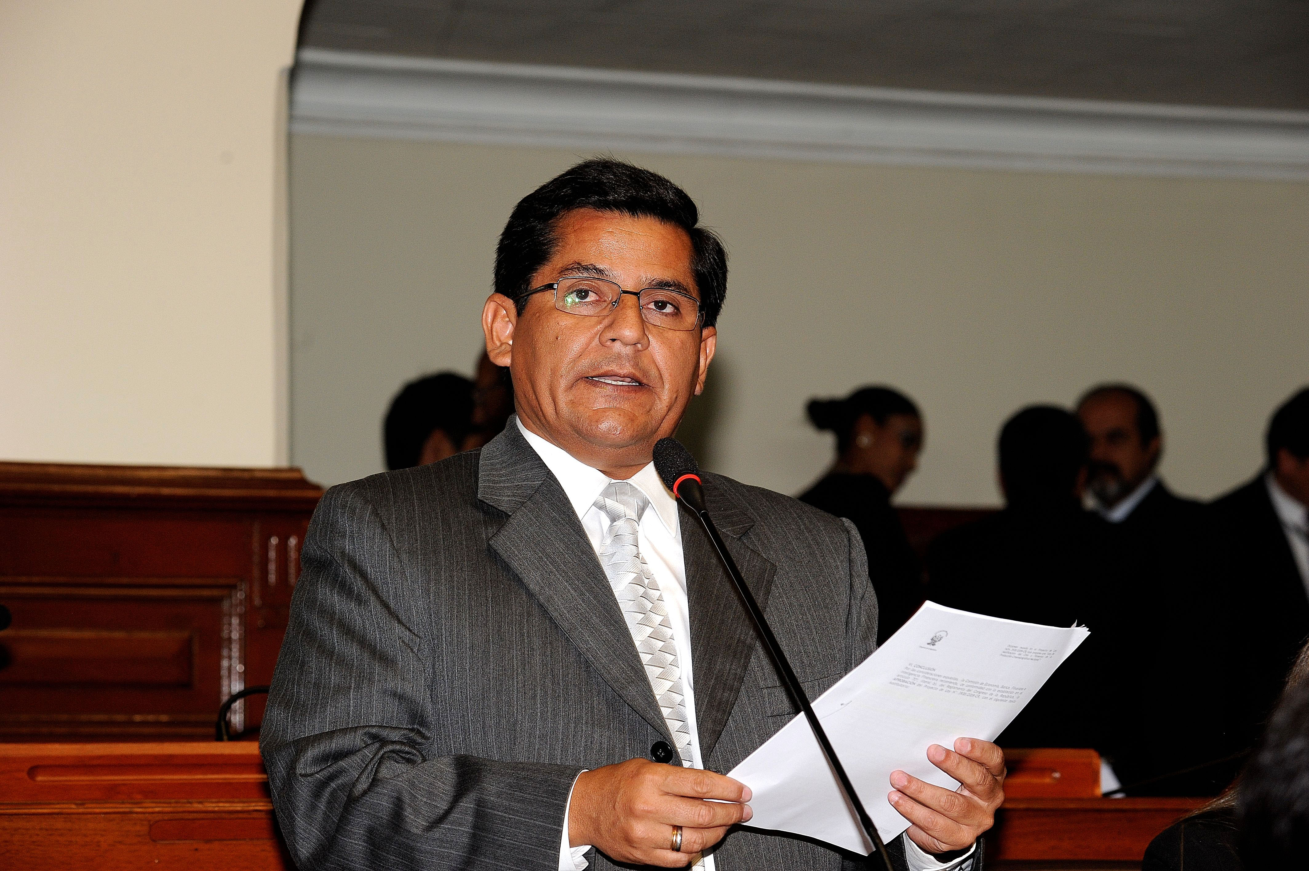 El legislador Jhony Peralta Cruz, expresa su posición en el debate parlamentario realizado esta mañana por el Pleno congresal.